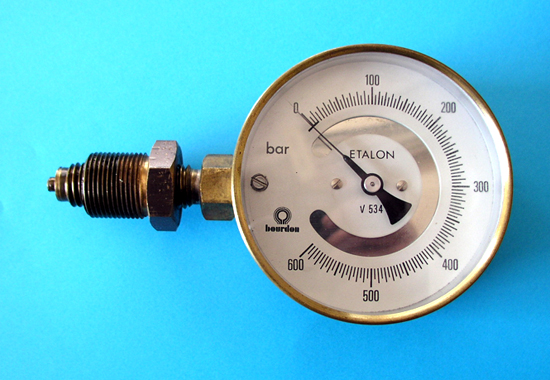 Manomètre